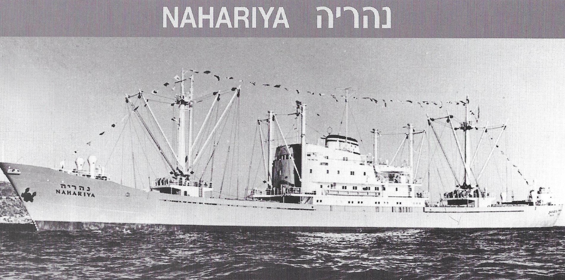 אוניית הסוחר נהריה